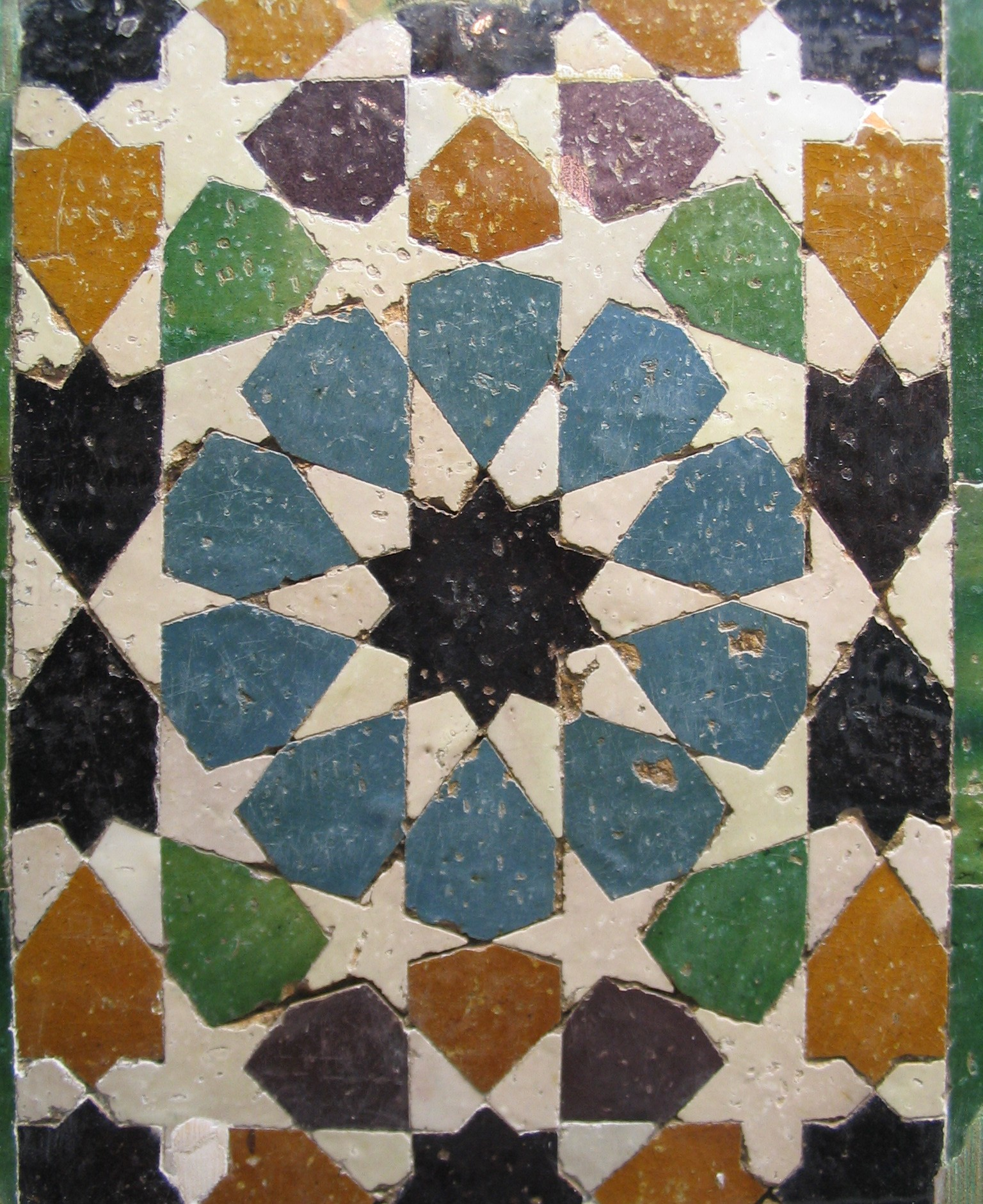 Alicatados, Alhambra de Grenade Espagne.